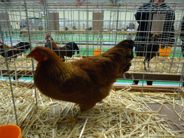 Poule de Dresde